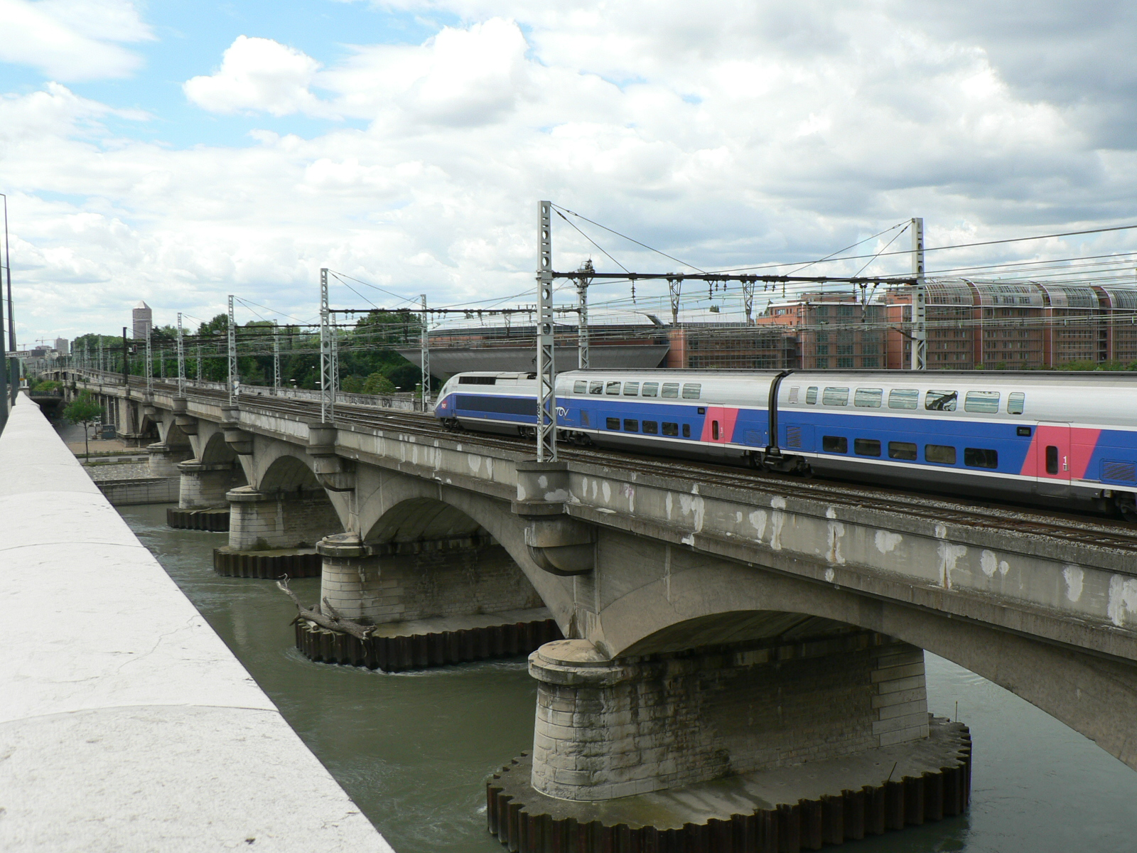 Ponts de Lyon - Viaduc SNCF (1857)